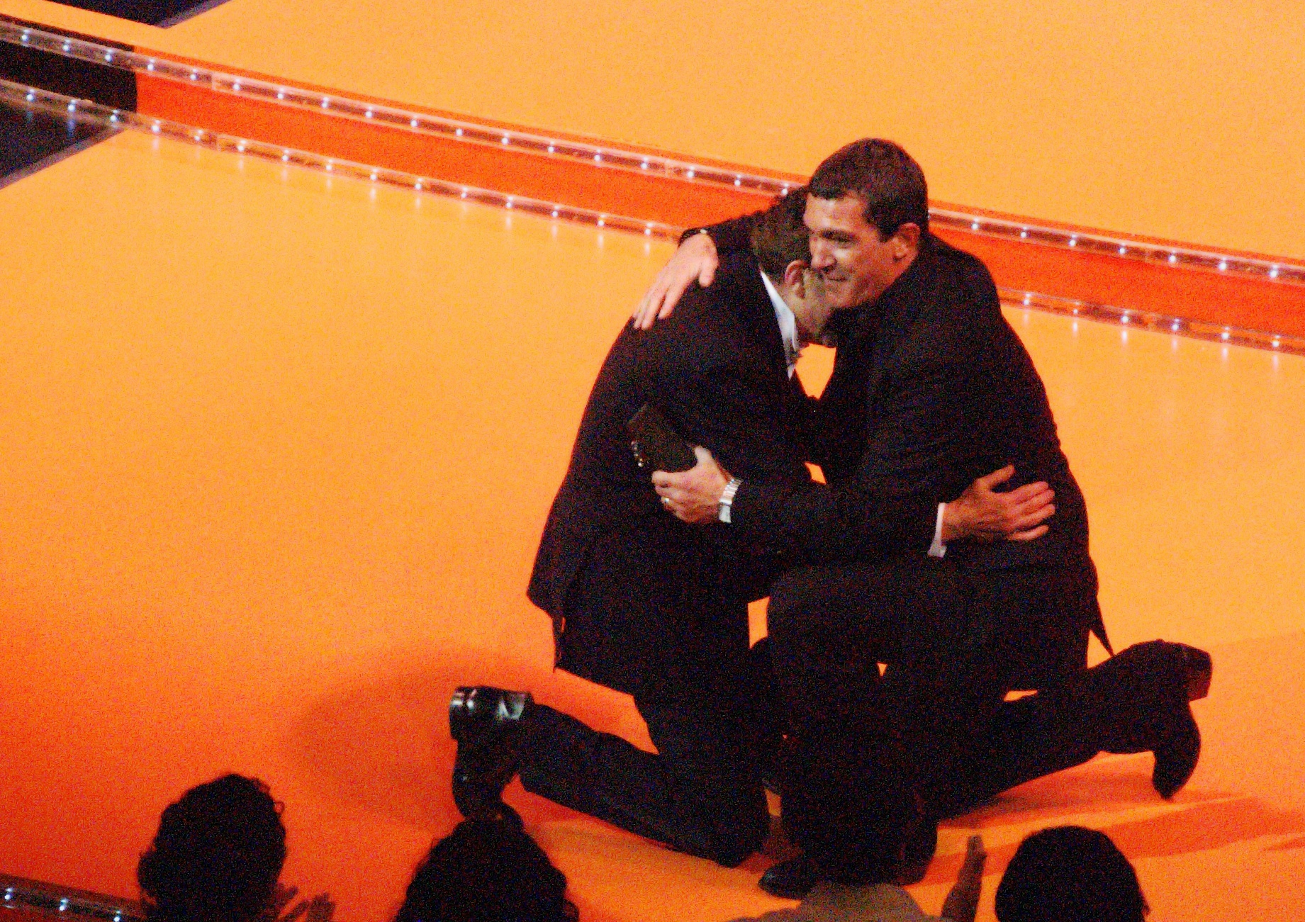 Antonio Banderas y Juan Diego en el Festival de Málaga Cine Español en 2009